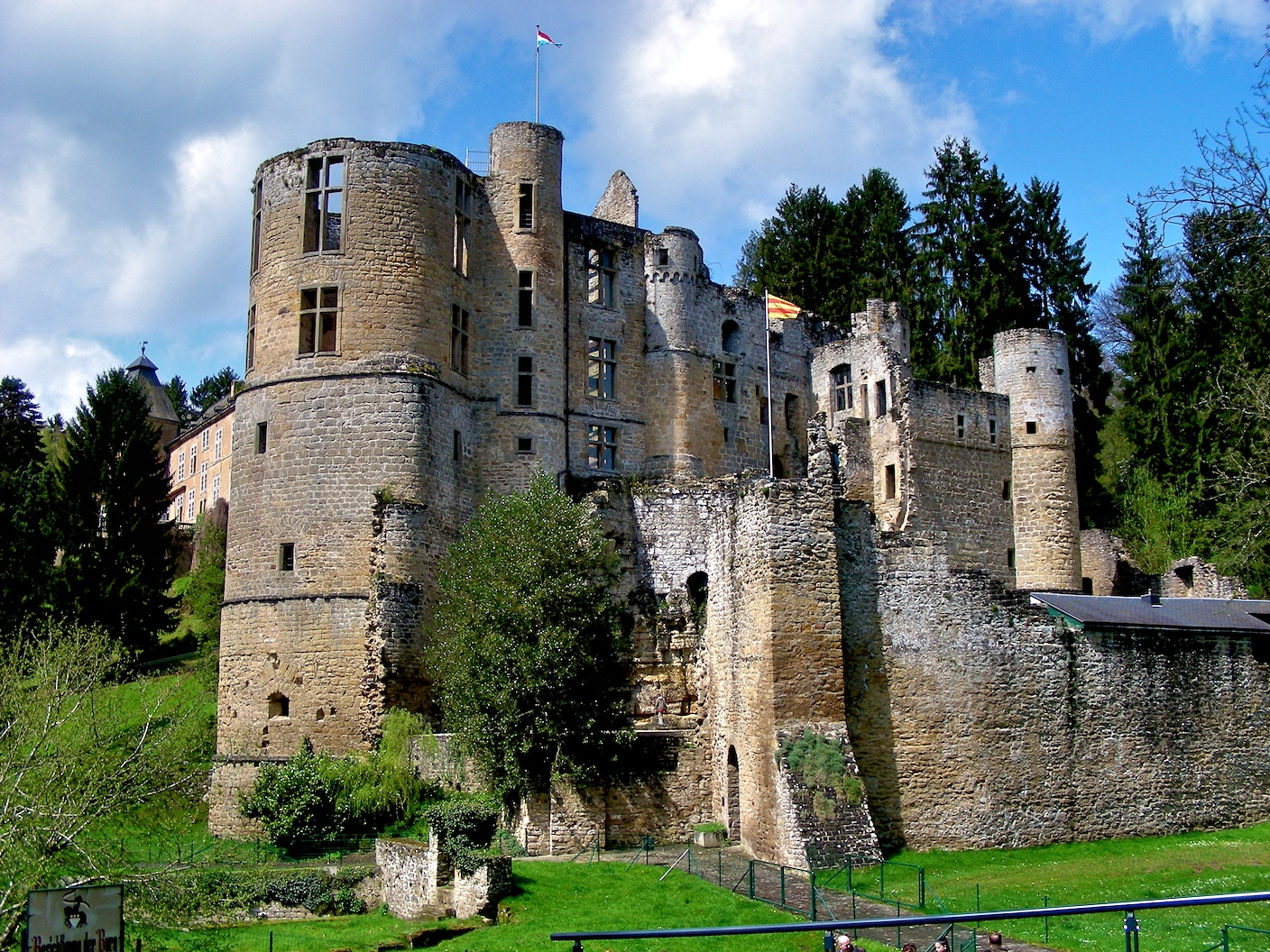 Beaufort Castle